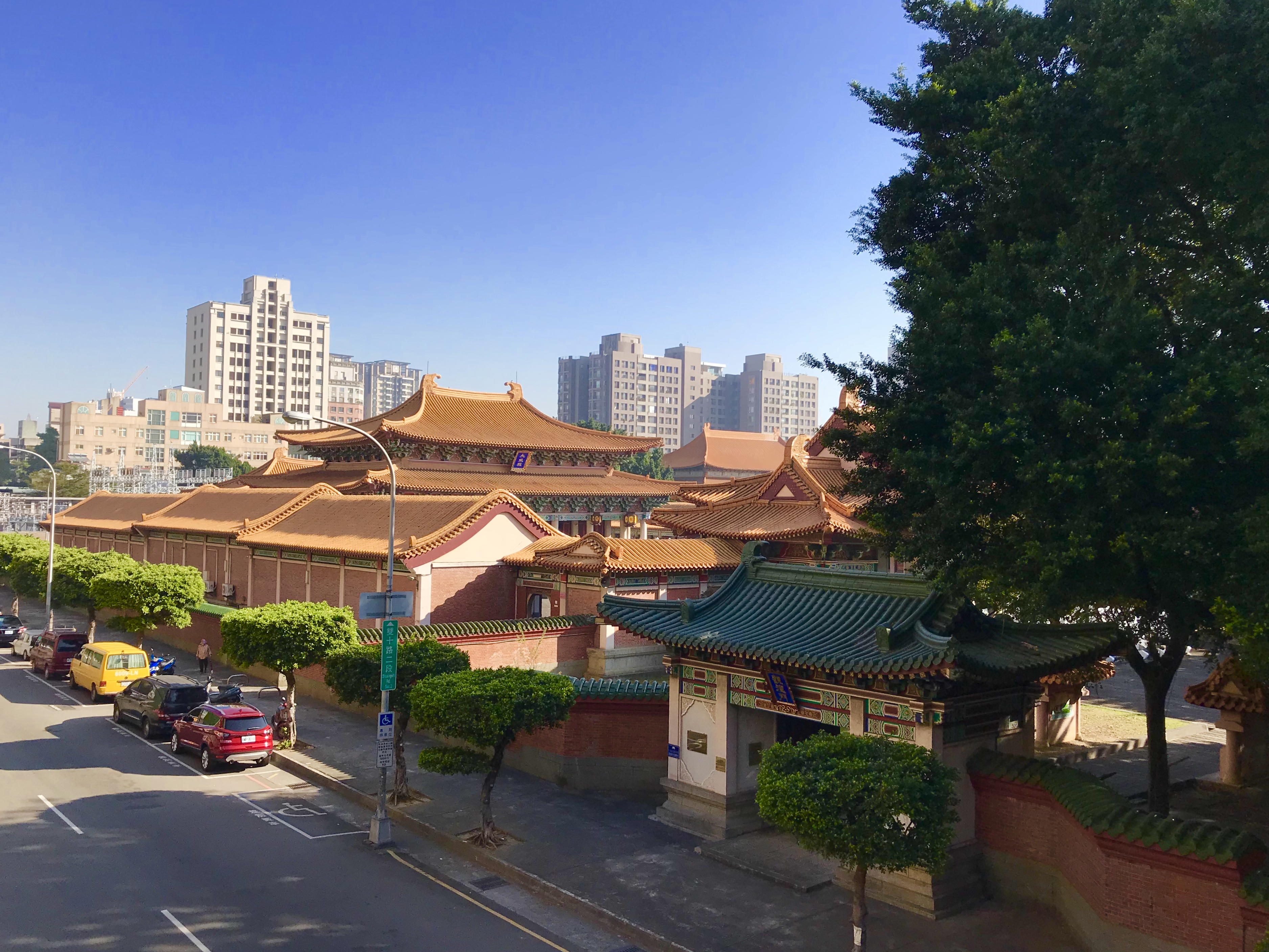 中文（台灣）: 從雙十路天橋望臺中孔子廟觀德門一側。